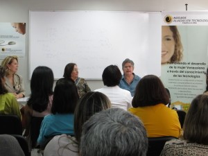 Gioconda Espina en dando una Charla para Mujeres en cadena.